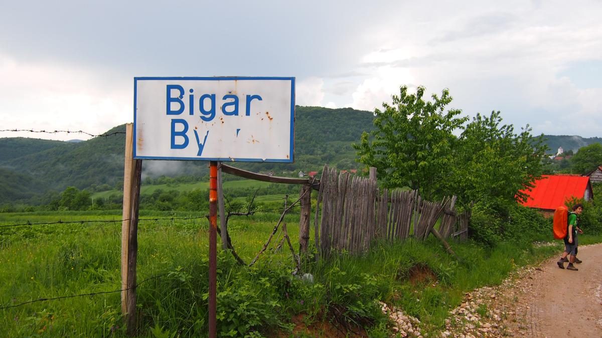 Cesta do Bígru.